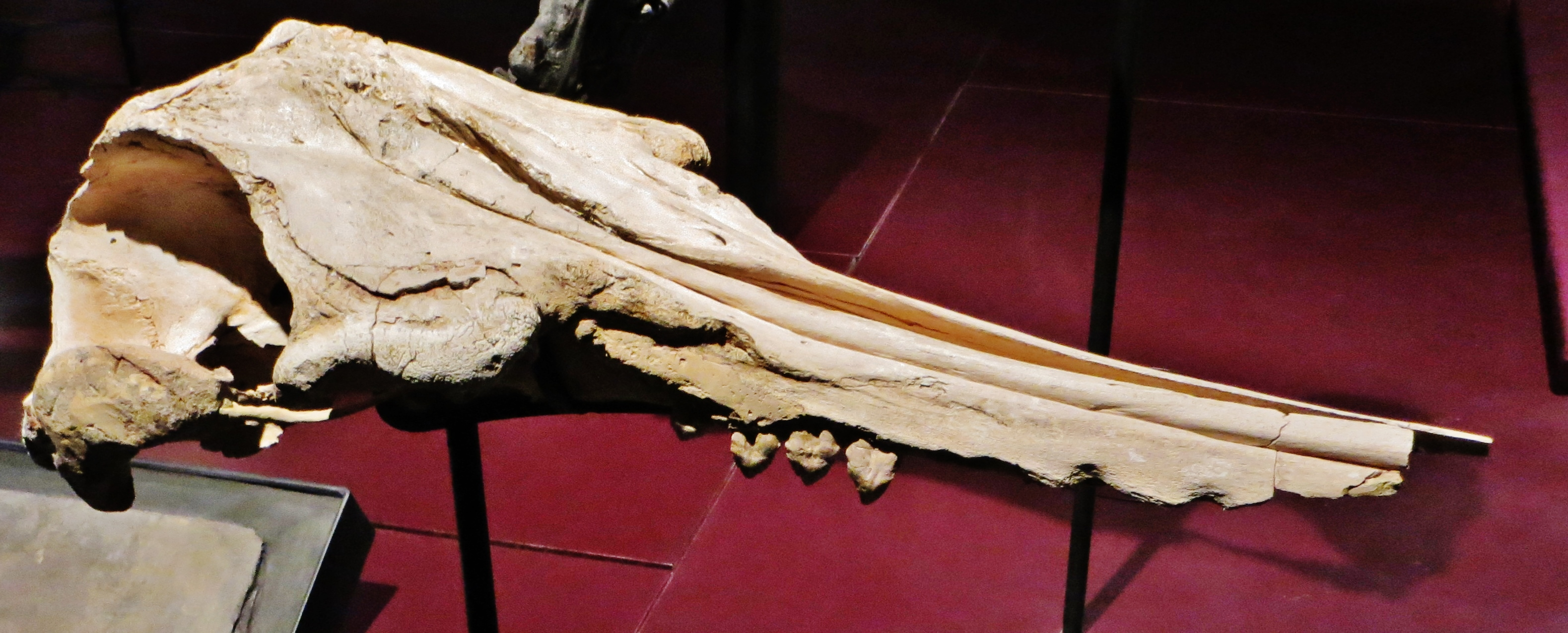 Fossil - Took the picture at Musee des Confluences, Lyon